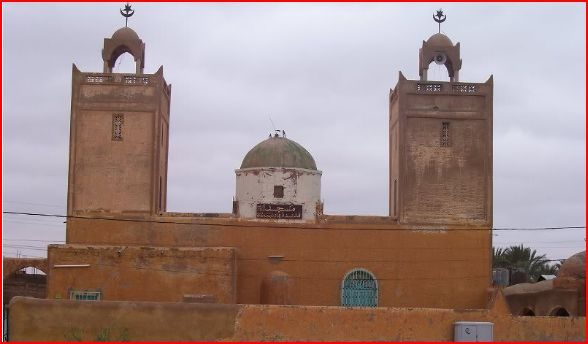 mosquée